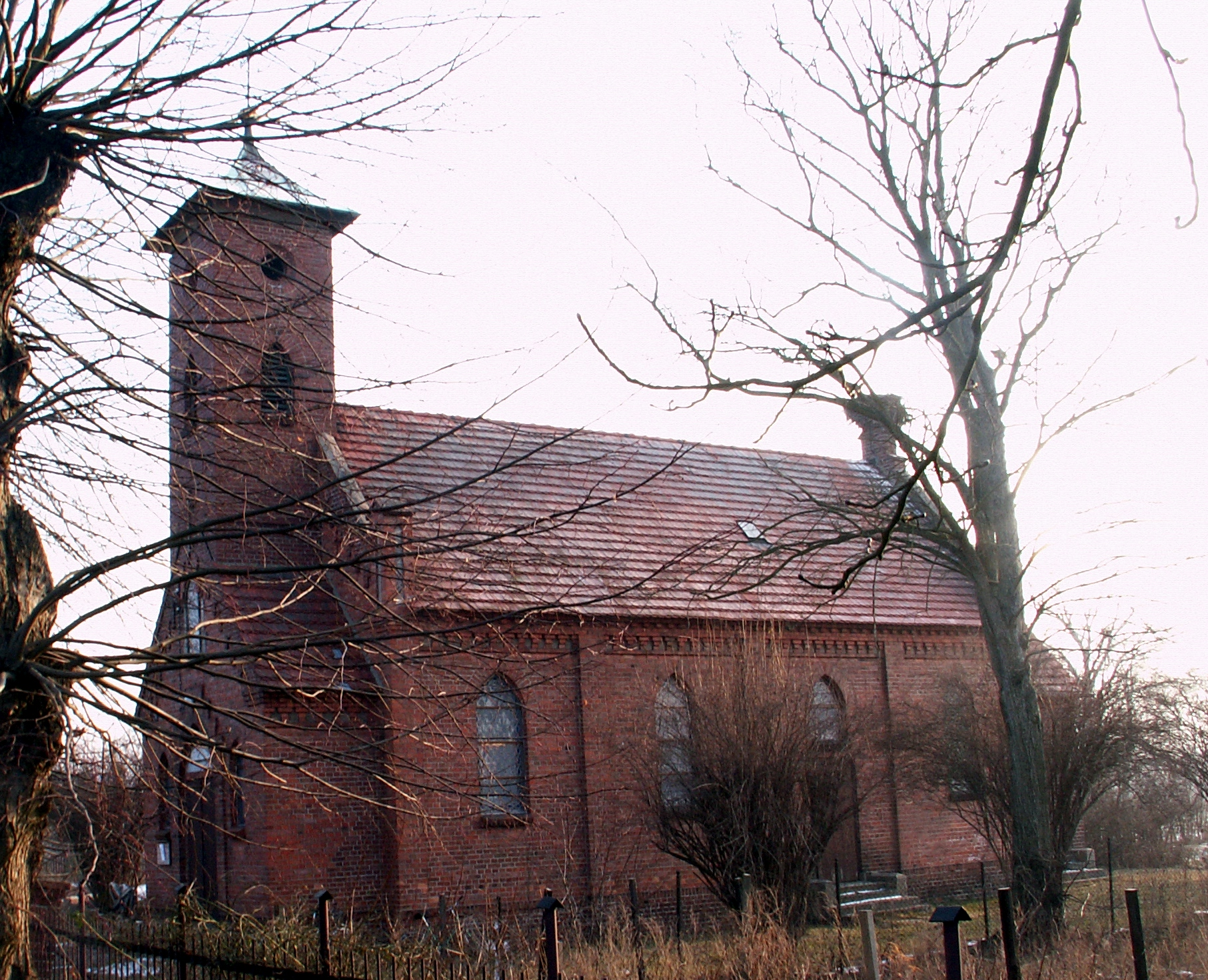 Zakęcie - kościół pw. Najświętszego Serca Pana Jezusa